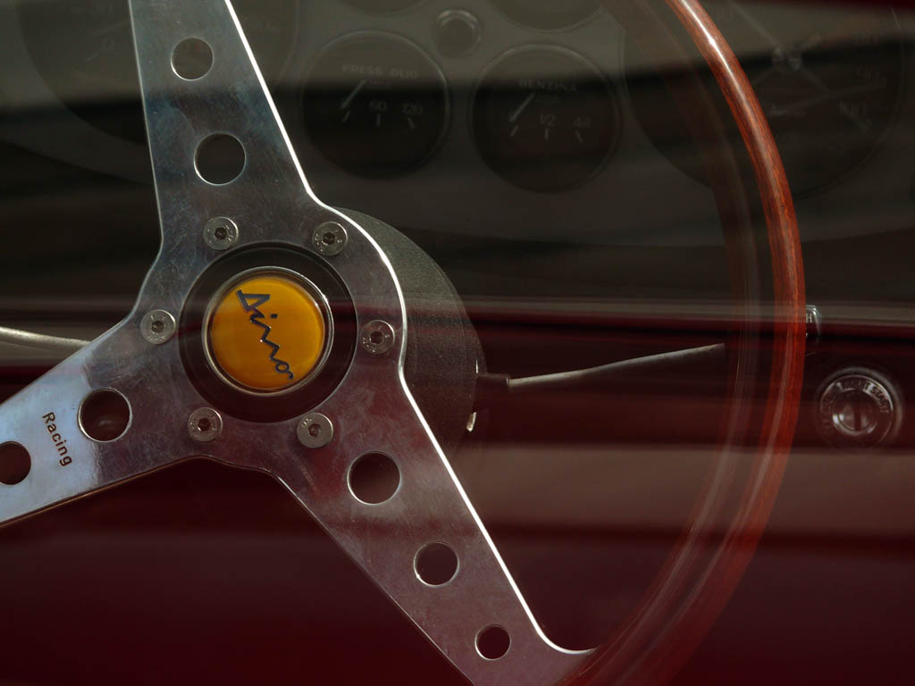 Ferrari Dino, steering wheel